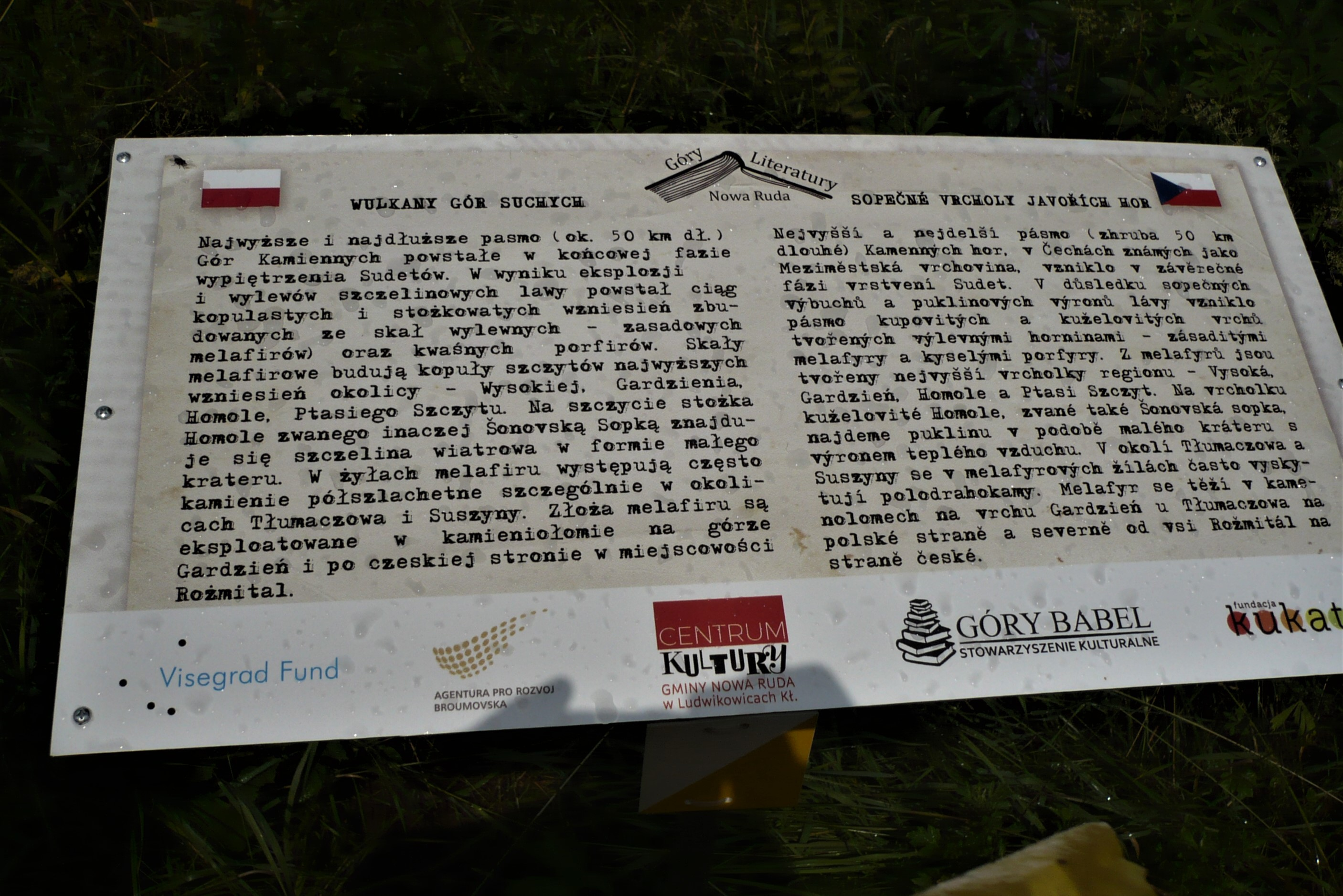 Tablica na Drodze Chlebowej Sonov - Włodowice